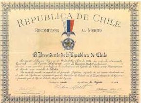 Copia a colori del Diploma di benemerenza concesso dal Governo Cileno ai Carabinieri italiani Attilio Felice Riva e Torquato Cremonesi